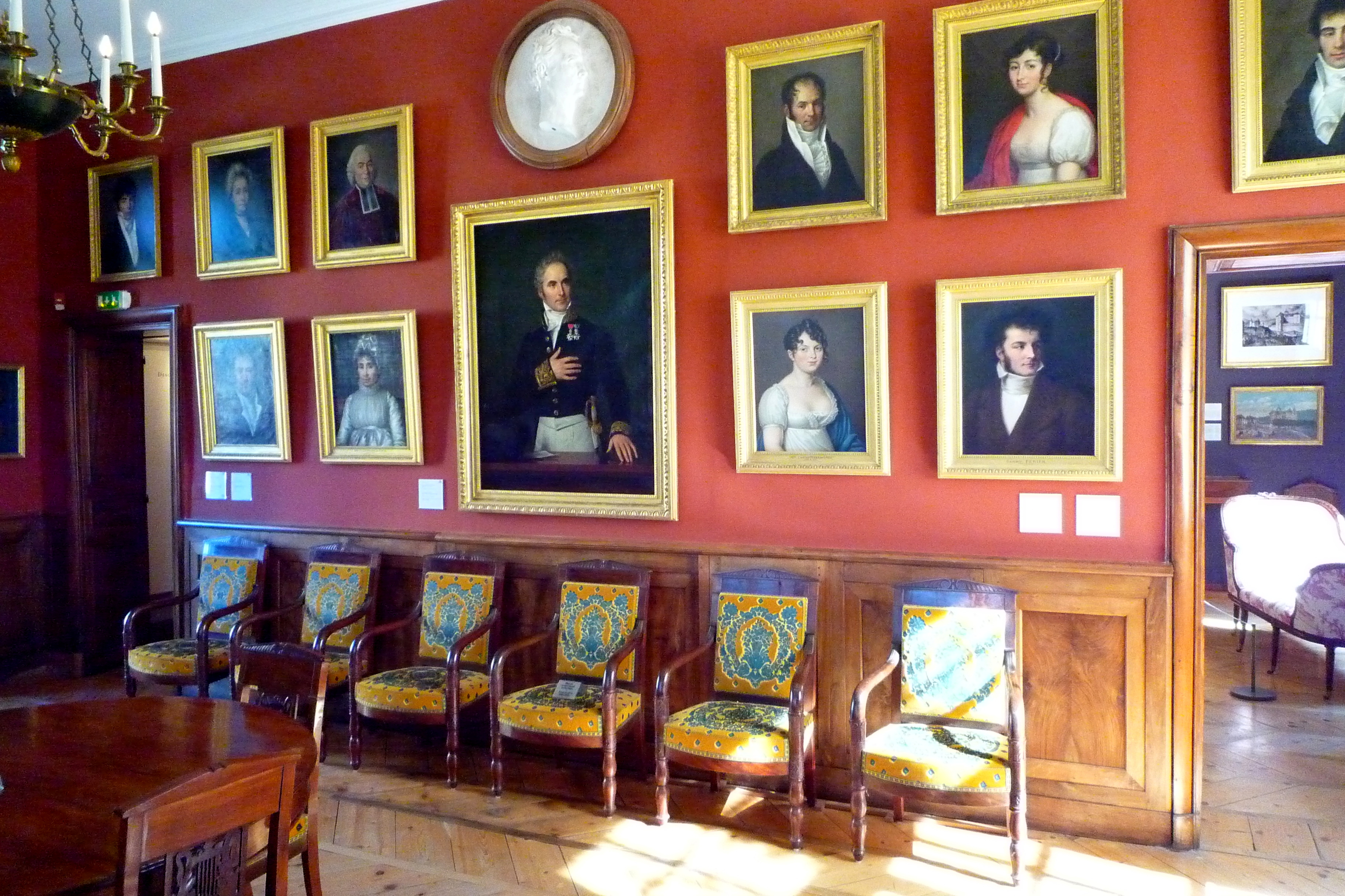 Salle de la famille Perier, niveau 3 du musée de la révolution française - Vizille (France)